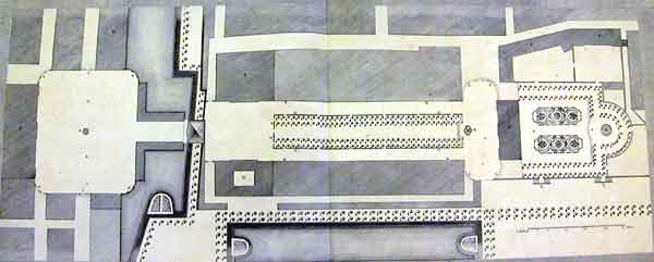 Plan-masse du quartier de la Place royale (incluant la Porte neuve et la Carrière)